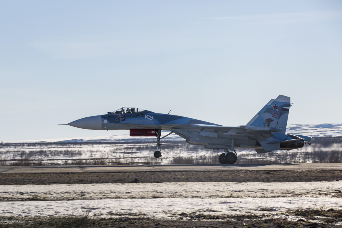 Плановые полёты лётчиков 279-го отдельного корабельного истребительного авиационного полка Северного флота на палубных истребителях Су-33 и штурмовиках Су-25УТГ (аэродром Североморск-3, Мурманская обл.)